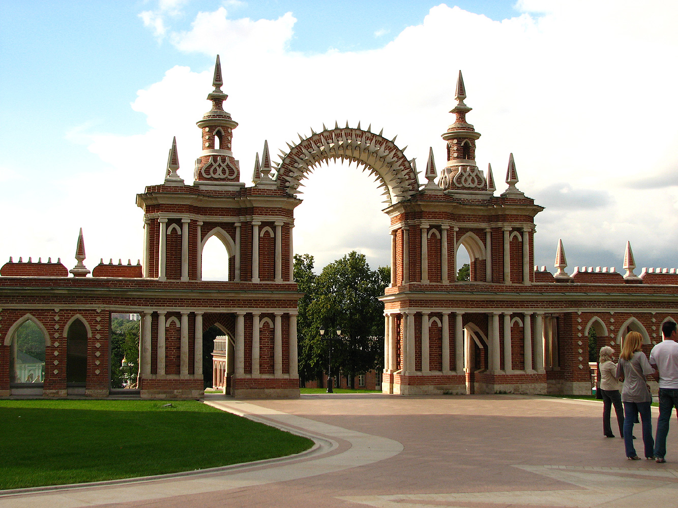 арка между Большим дворцом и Хлебным домом